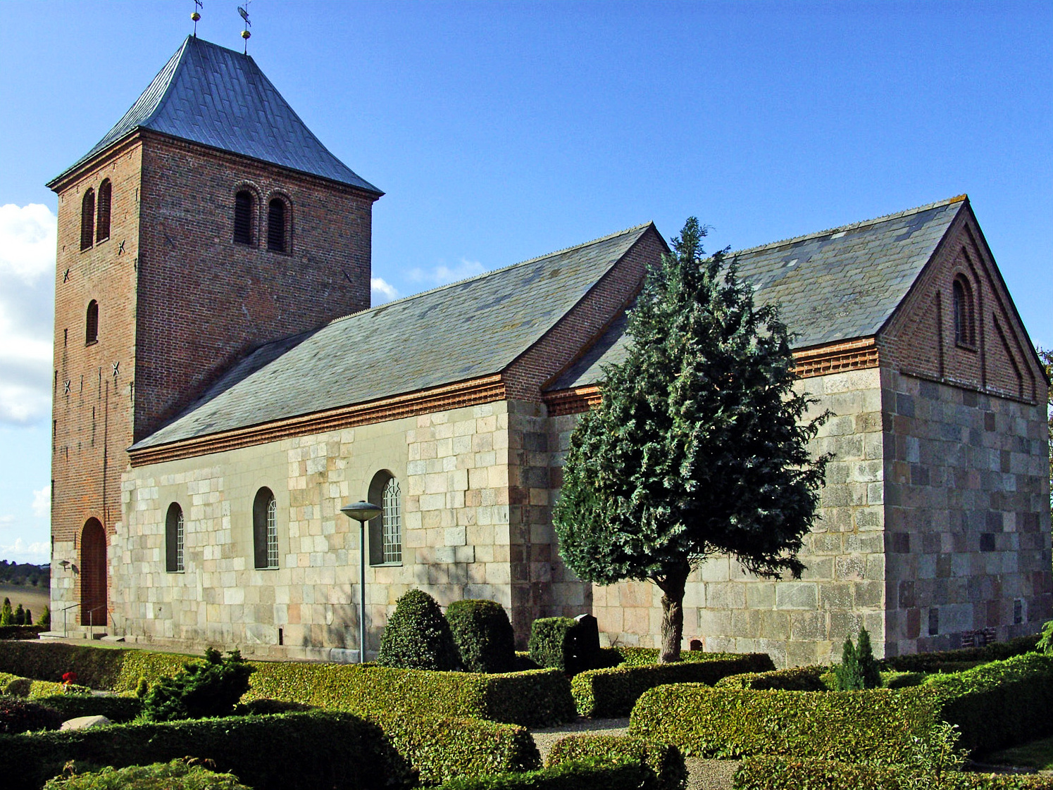 Lyngå kirke, Favrskov, fra sydøst